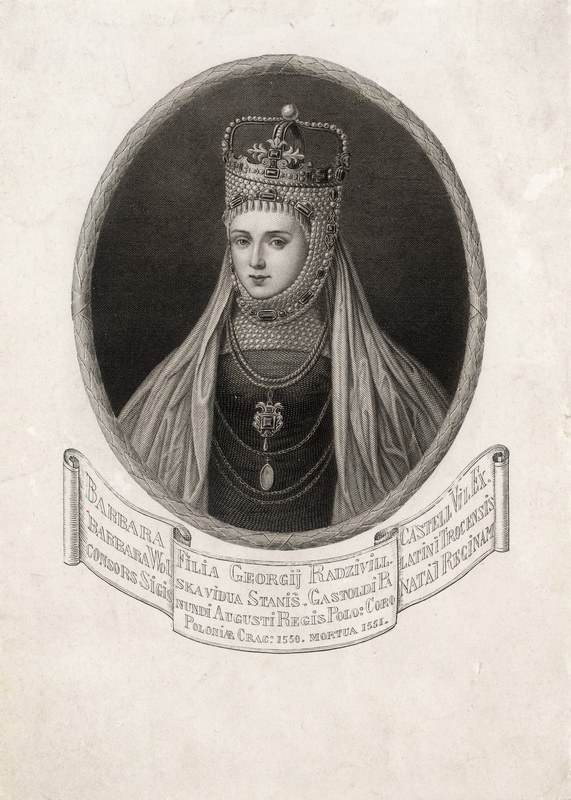 Барбара Радзівіл